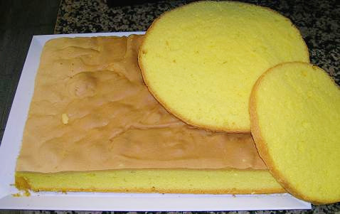 pan di spagna